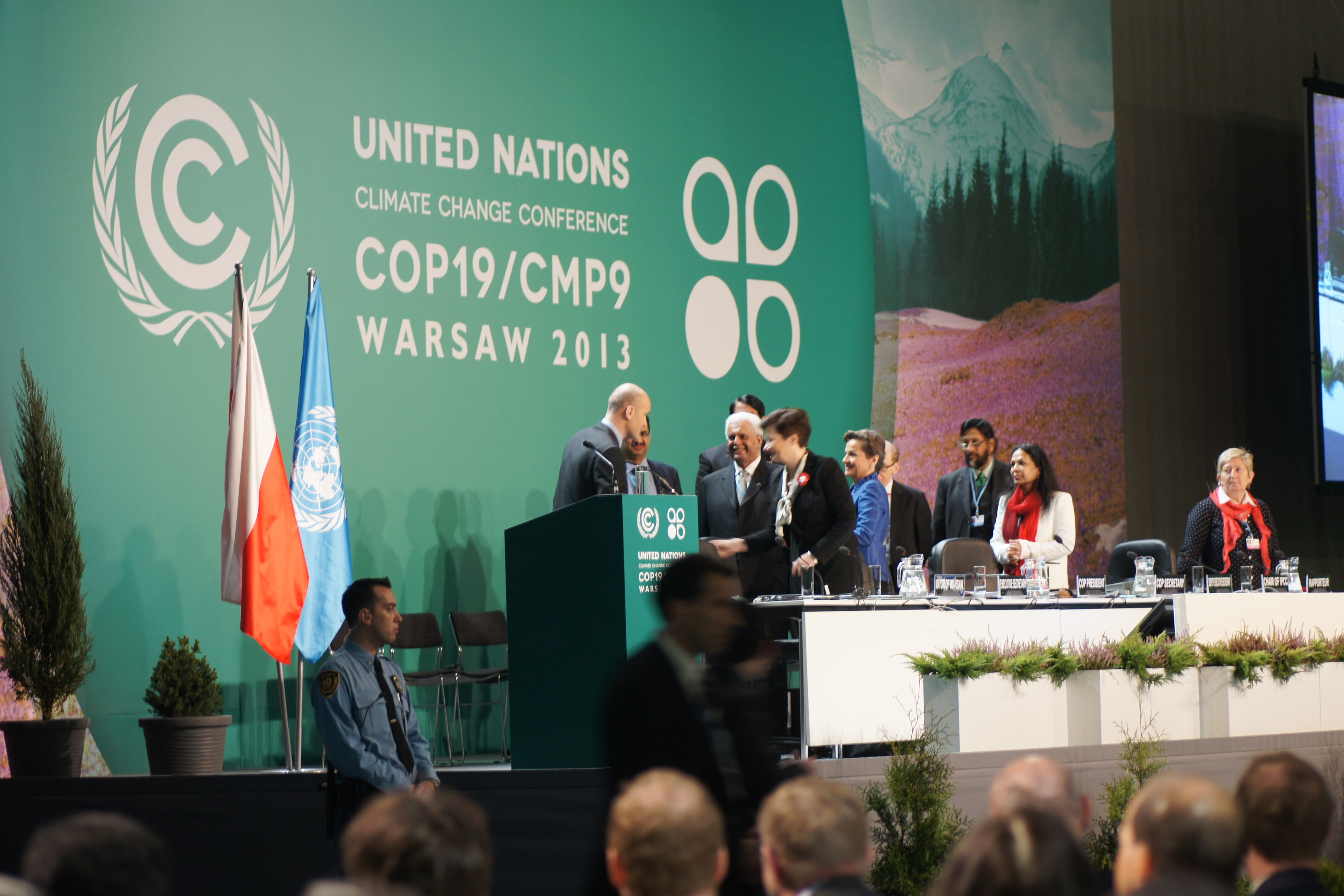 COP19 at National Stadium